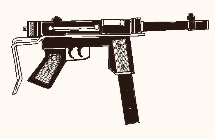 vista de subfusil Halcón ML-63